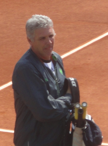 Andrés Gómez lors du Trophée des Légendes 2011 à Roland-Garros